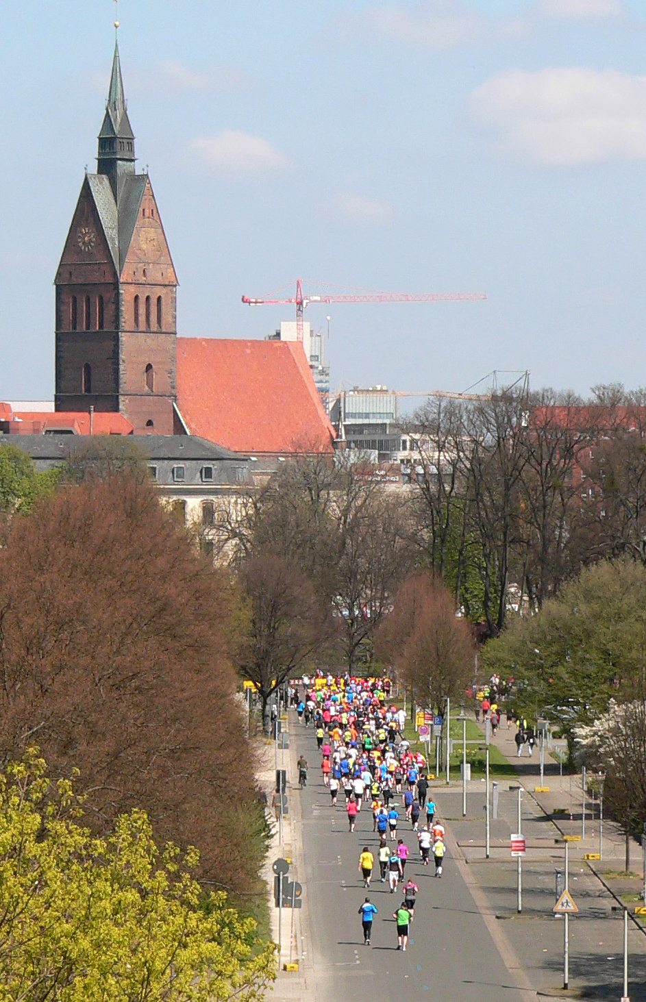 Marathon Hannover